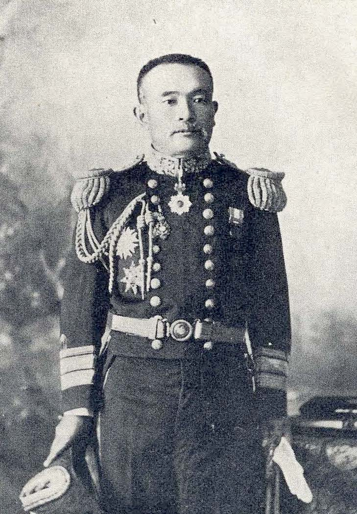 黒岡帯刀 Kurooka Tatewaki